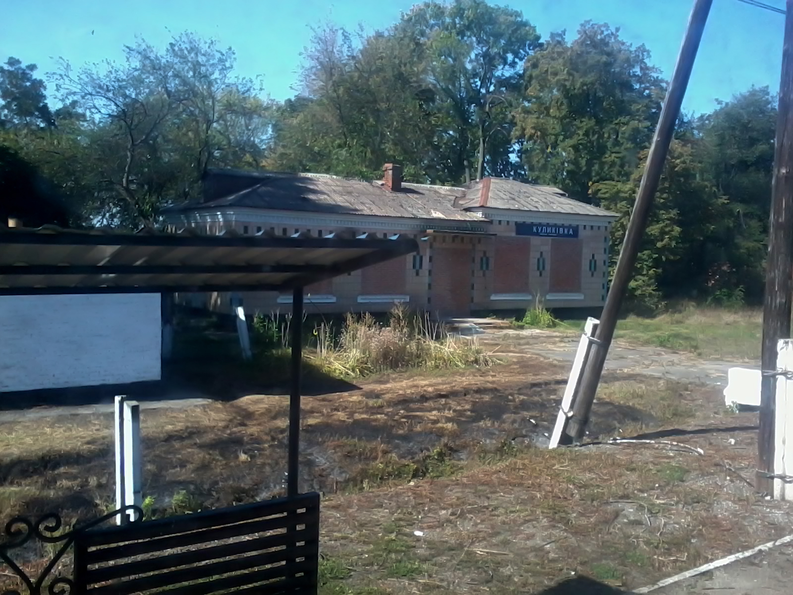 Зупиночний пункт Куликівка Полтавської дирекції Південної залізниці 49°13′33″N 34°00′22″E / 49.225747°N 34.006022°E